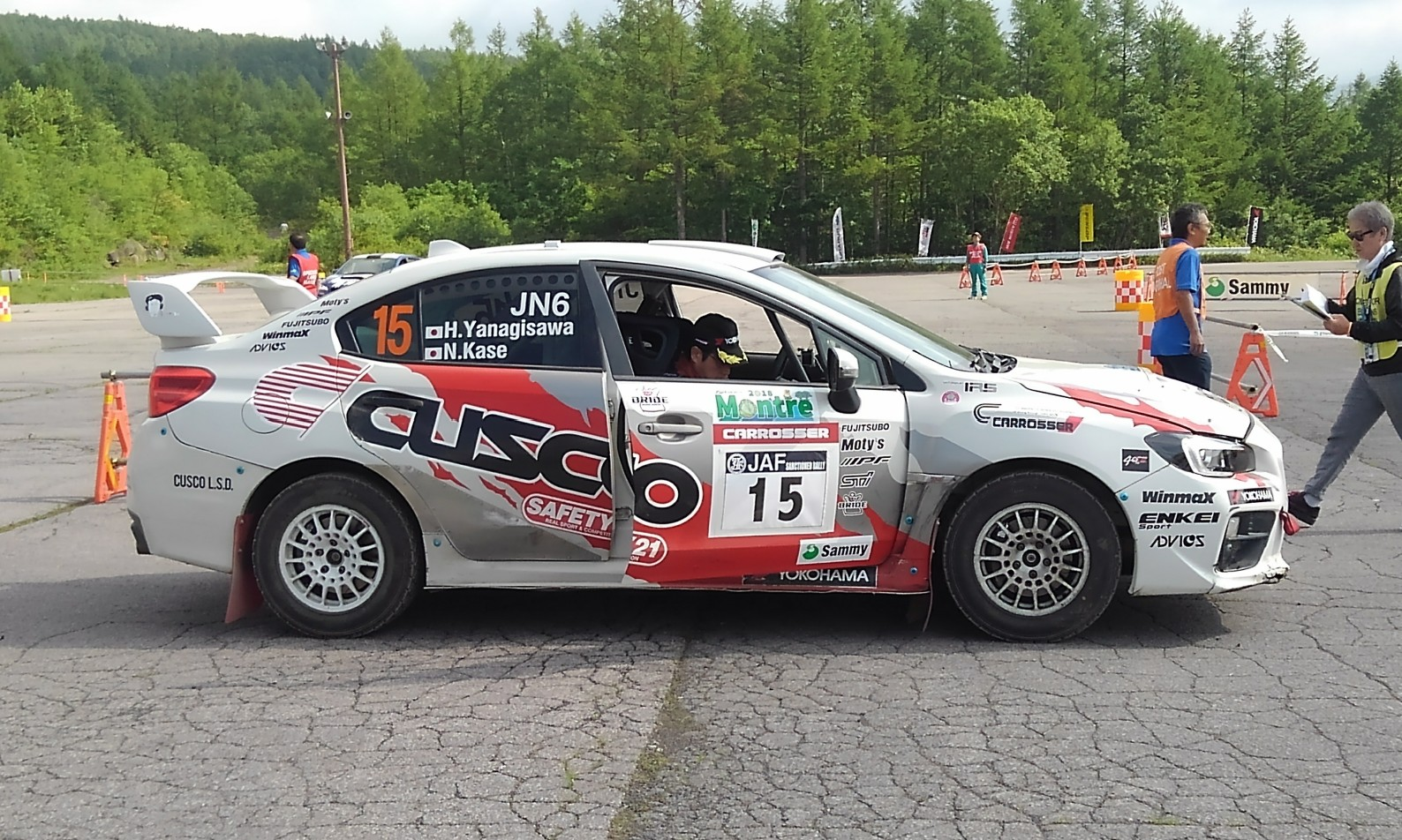 全日本ラリー選手権にて、クスコのスバル・WRX STI